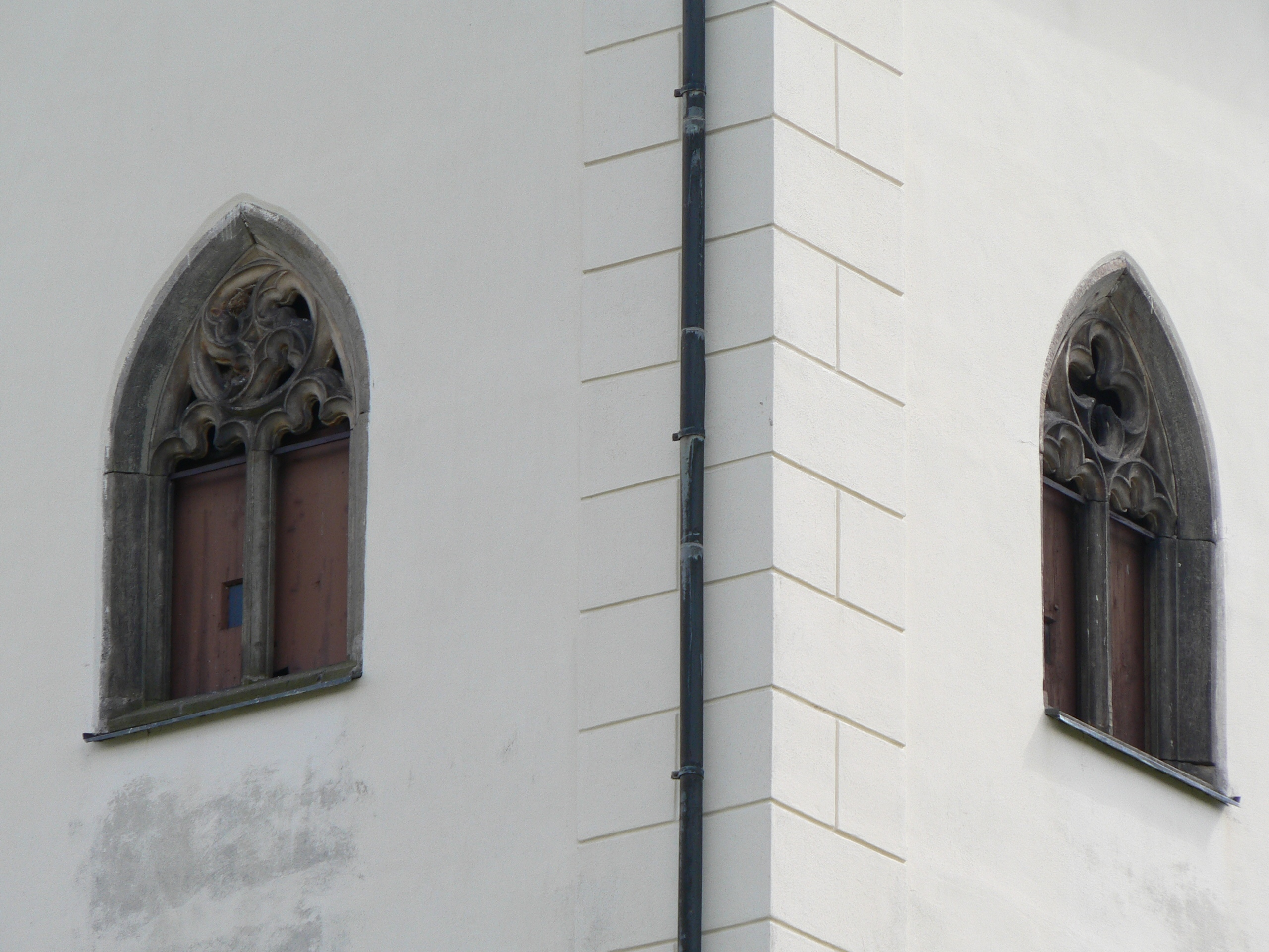 Kostel svatého Martina (Měrotín) - gotické kružby v oknech věže.